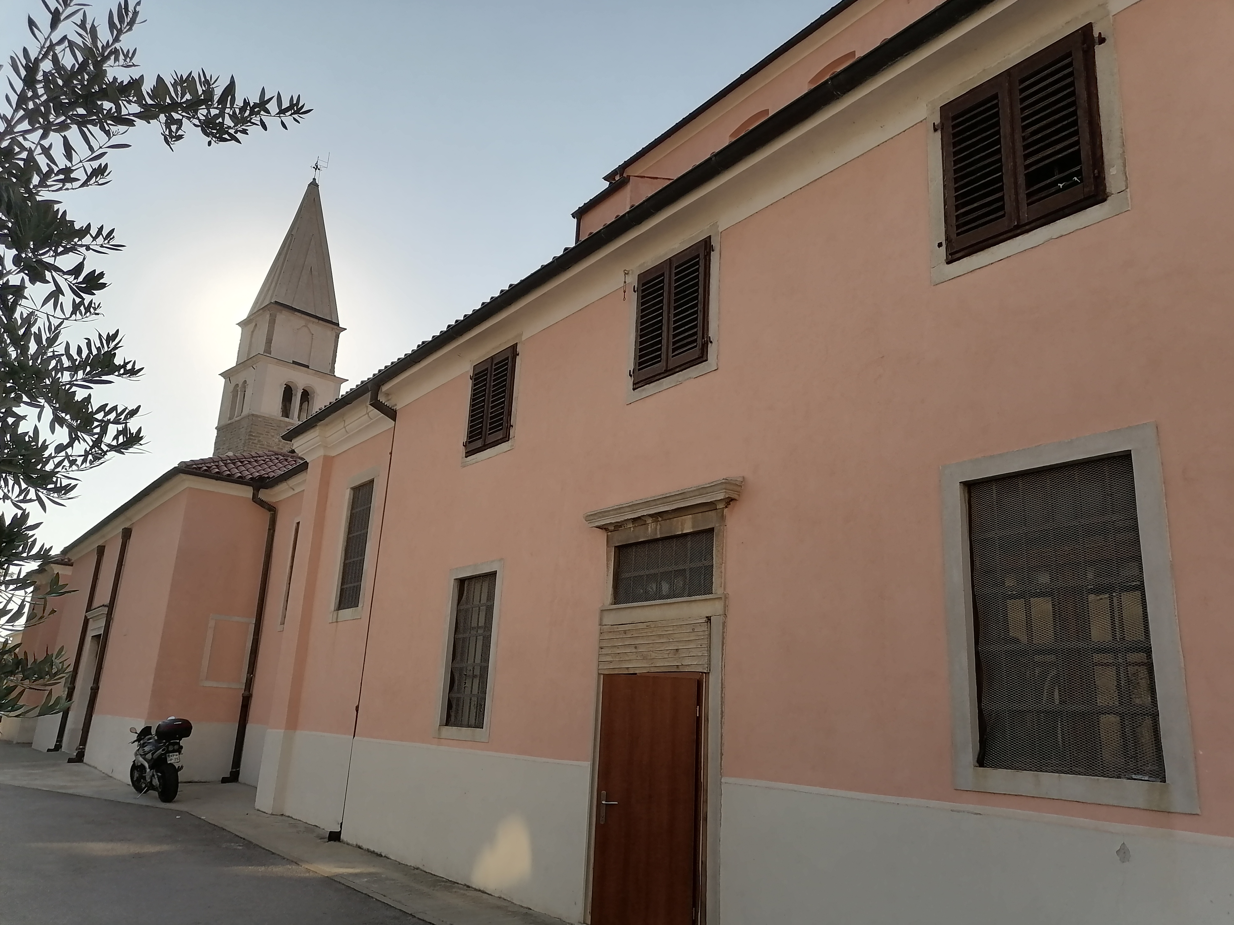 Cerkev sv. Mavra, Izola